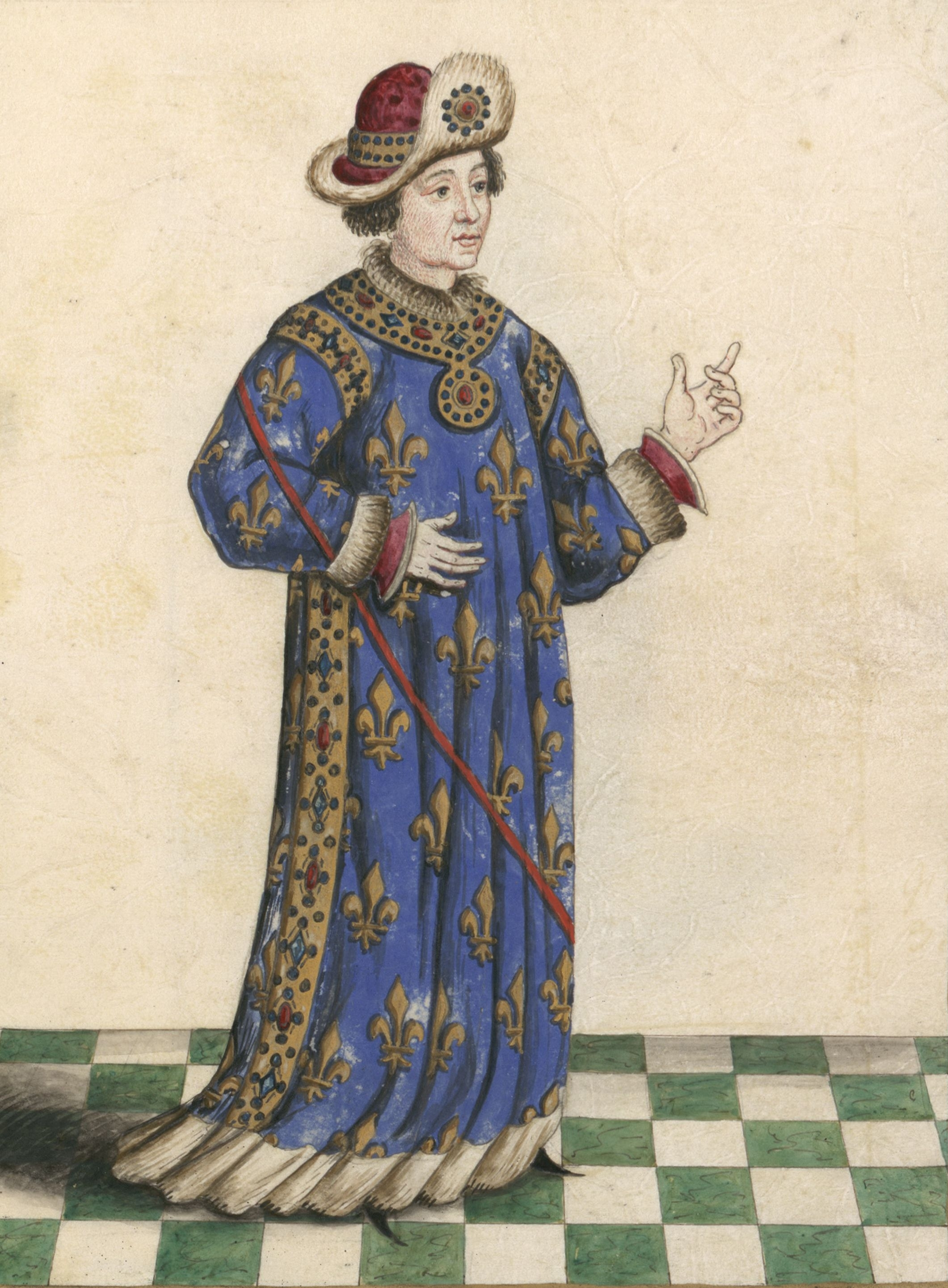 Robert de Clermont (1256-1317), dessin relevé pour Gaignières.